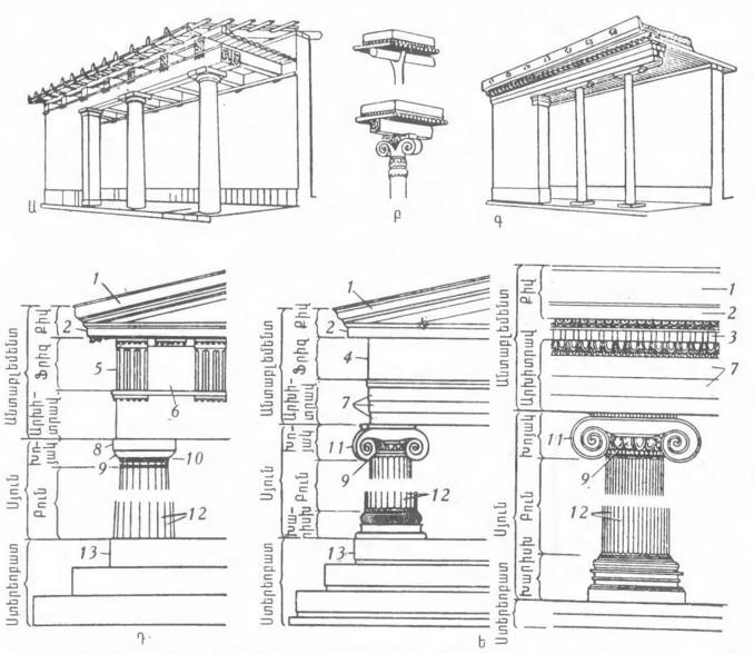 Հին հունական օրդերների տարատեսակներ